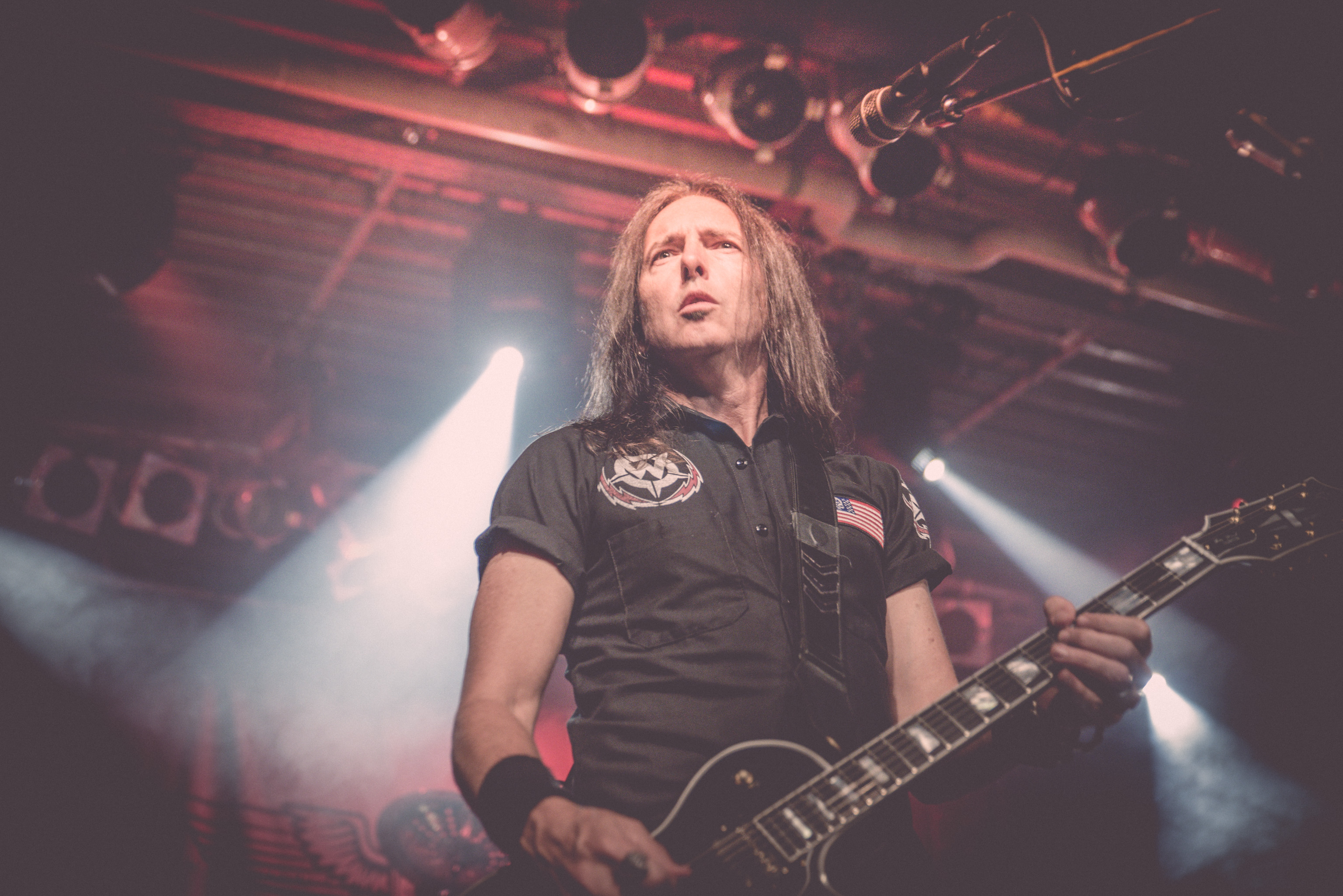 de